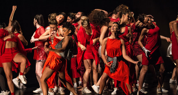 תמונת מחול